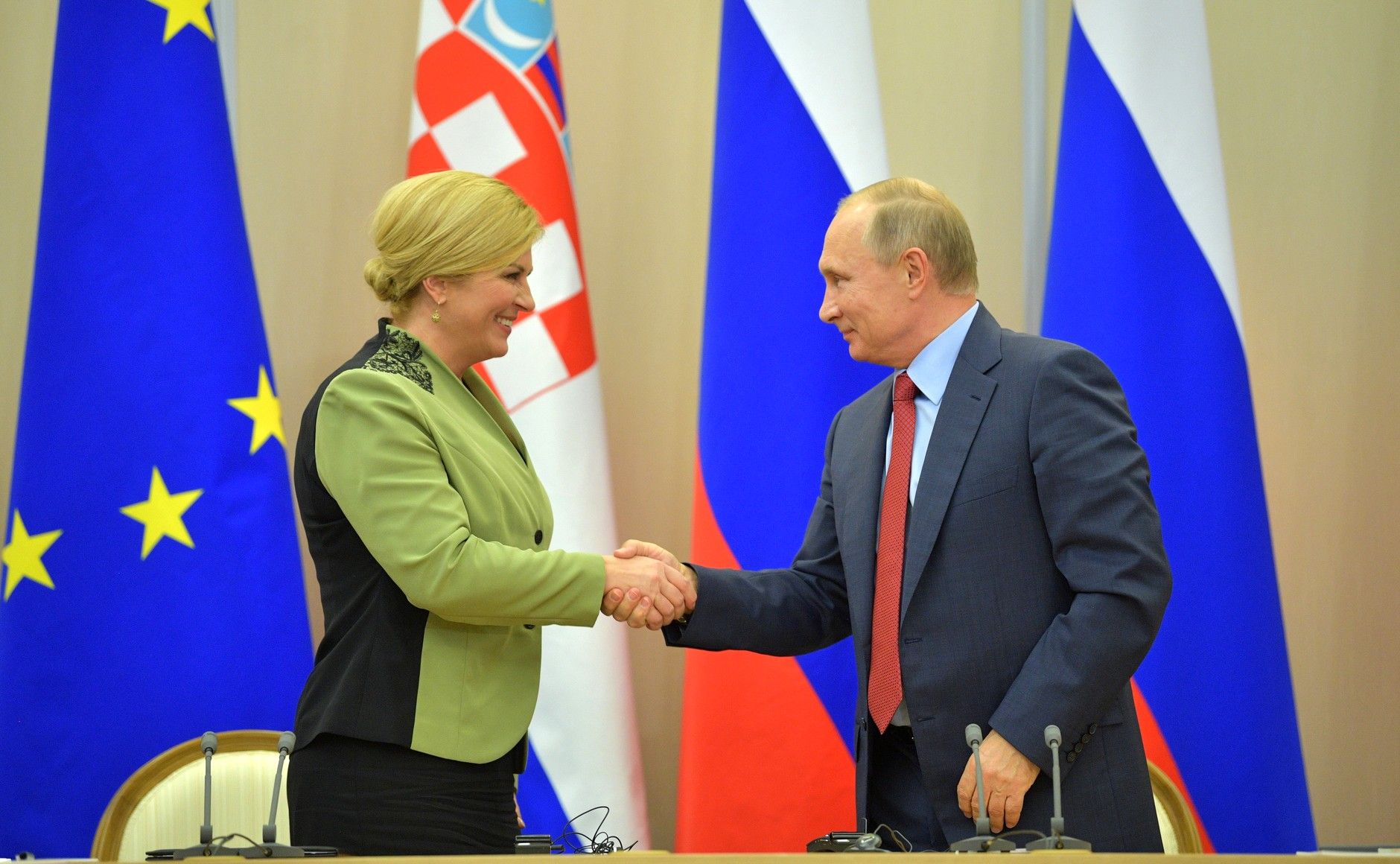 Президент России Владимир Путин с Президентом Республики Хорватии Колиндой Грабар-Китарович по завершении российско-хорватских переговоров